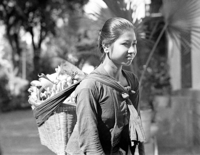 Negatief. Jonge vrouw die terugkomt van de markt met koopwaar op de rug